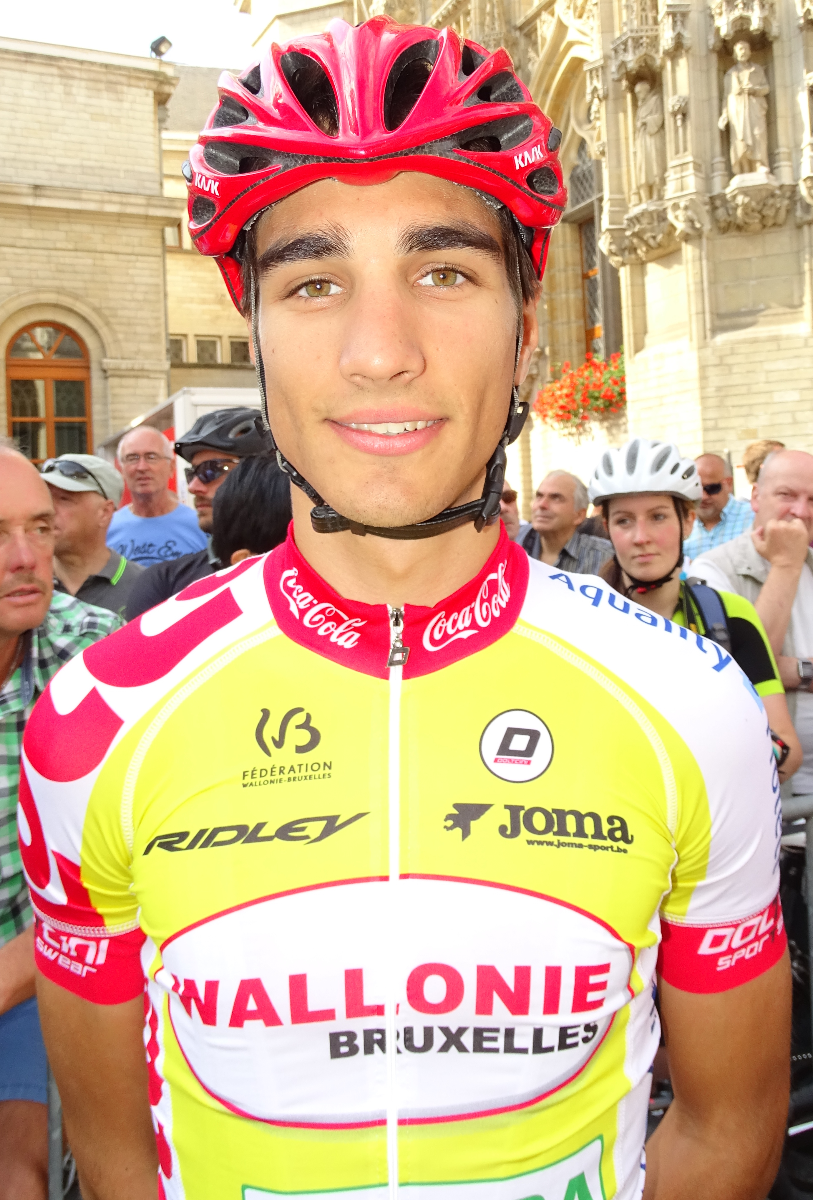 Reportage réalisé le dimanche 23 août à l'occasion du départ et de l'arrivée du Grand Prix Jef Scherens 2015 à Louvain, Belgique.